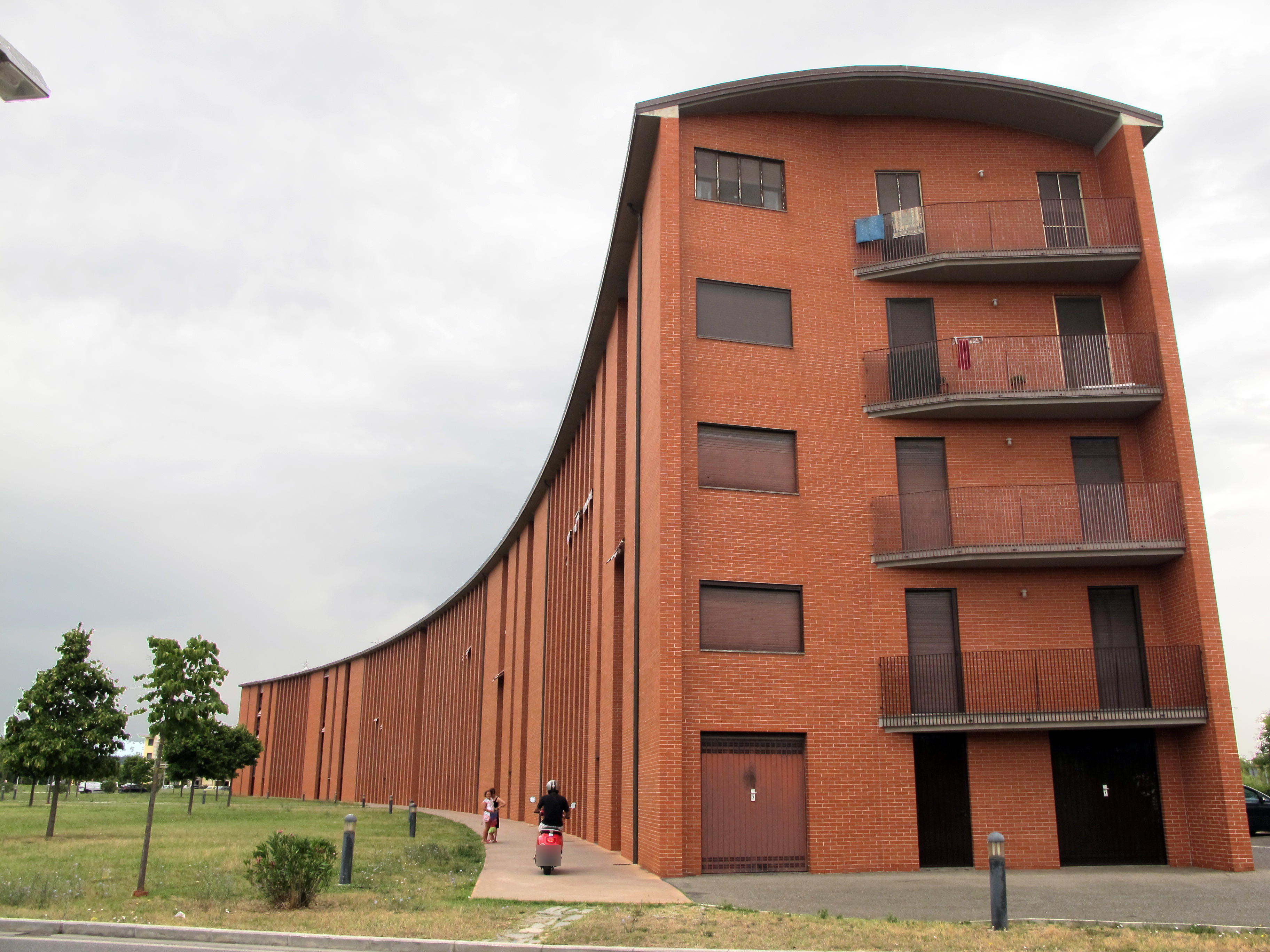 Pontedera